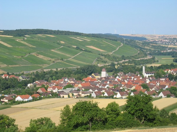 Bad Mergentheim-Markelsheim